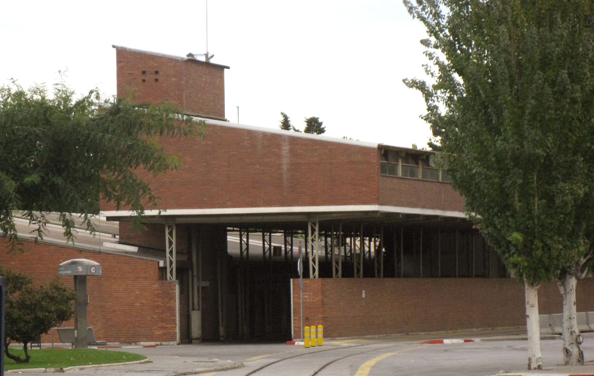 Menjadors de la fàbrica d'automòbils SEAT a la Zona Franca (Barcelona). Edifici neoracionalista de Manuel Barbero, Rafael de la Joya i César Ortiz-Echagüe (1954-56). Vista de la façana posterior, l'única visible des de l'exterior del recinte.